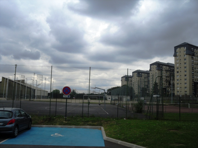 Le complexe sportif Alain Picot de Montgeron (91)